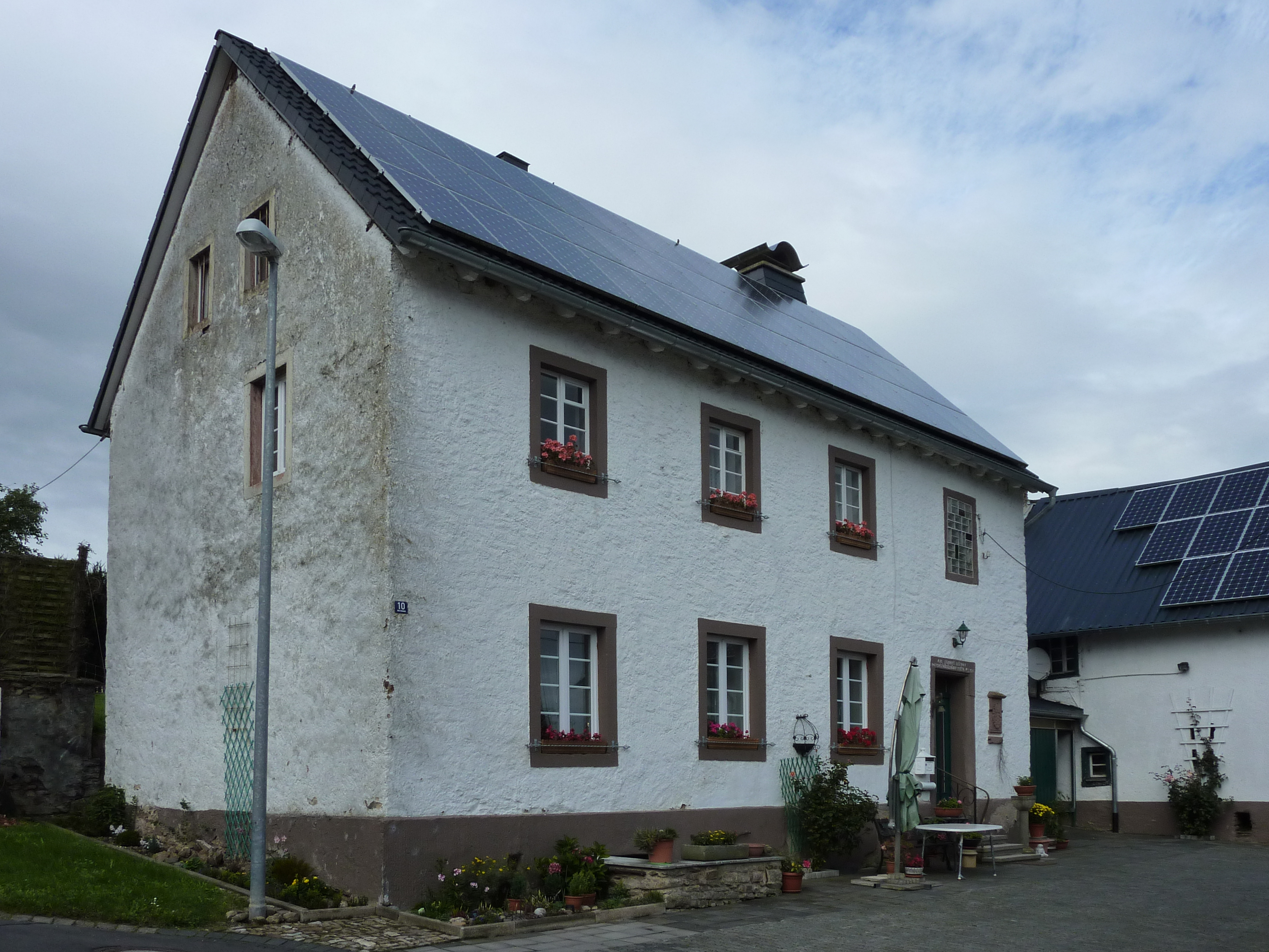 Uedelhoven, Alte Schulstraße 10, ehemalige Schule 1